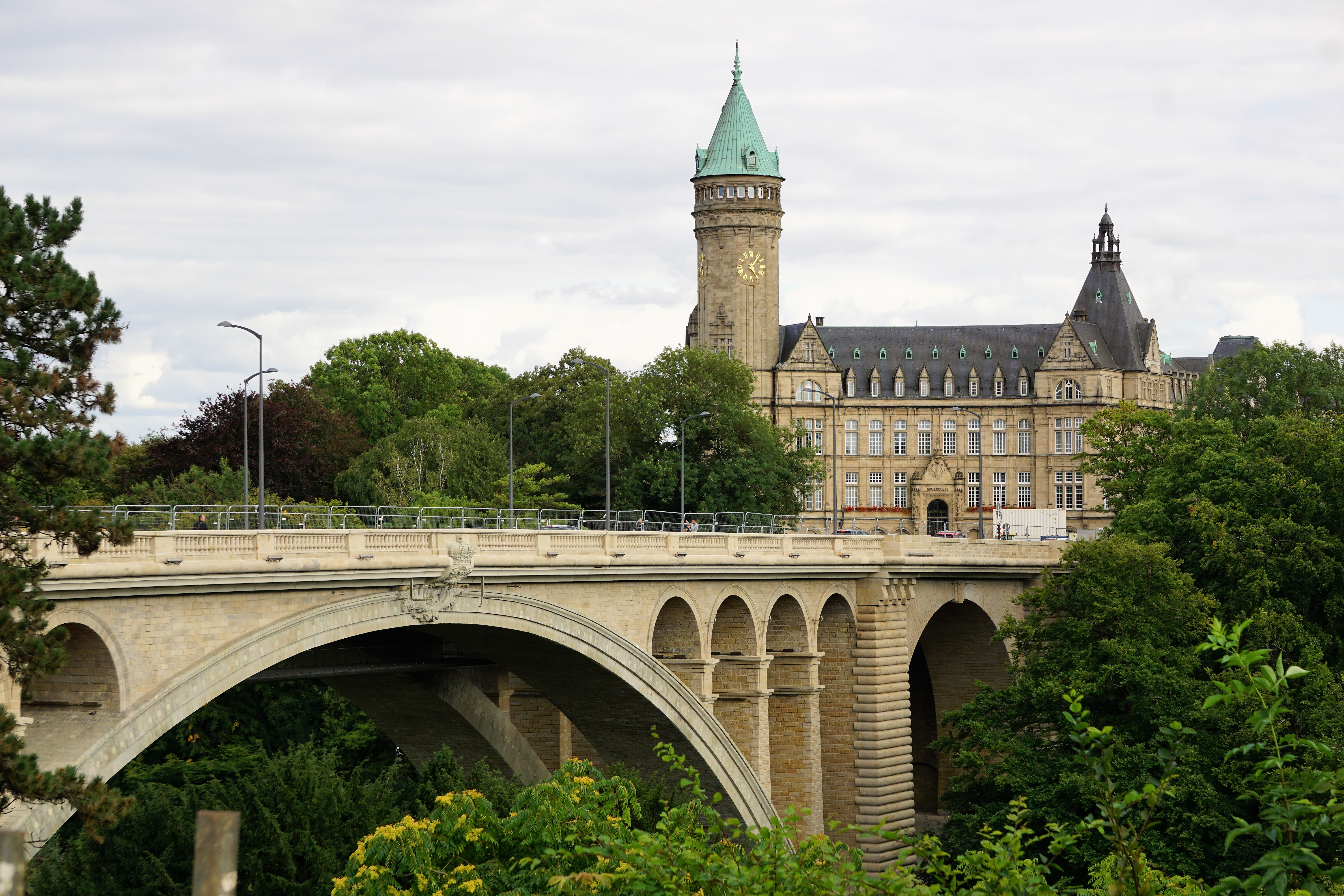 Le Pont Adolphe après sa rénovation (2017). À droite la Banque et Caisse d'Épargne de l'État